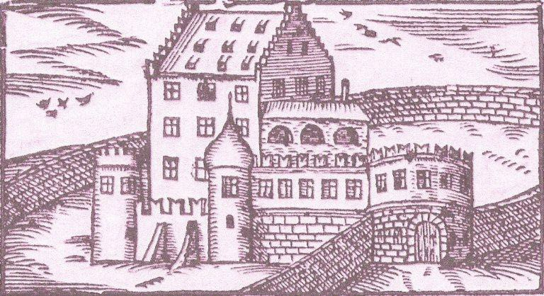 Schloss Eisenhofen im 16. Jahrhundert - (Philipp Apian)